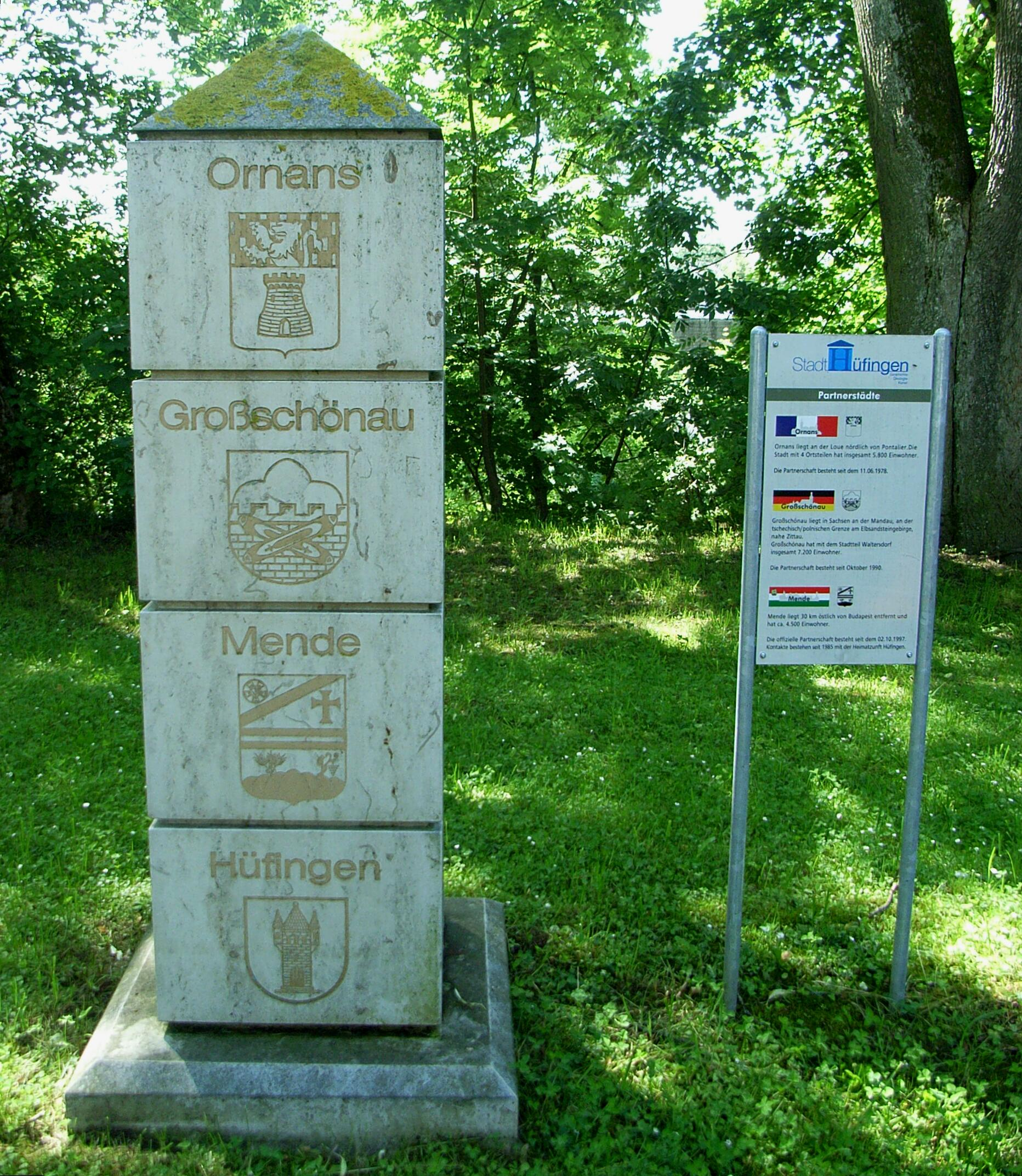 Dieses Bild zeigt ein Denkmal über die Städtepartnerschaften von Hüfingen.